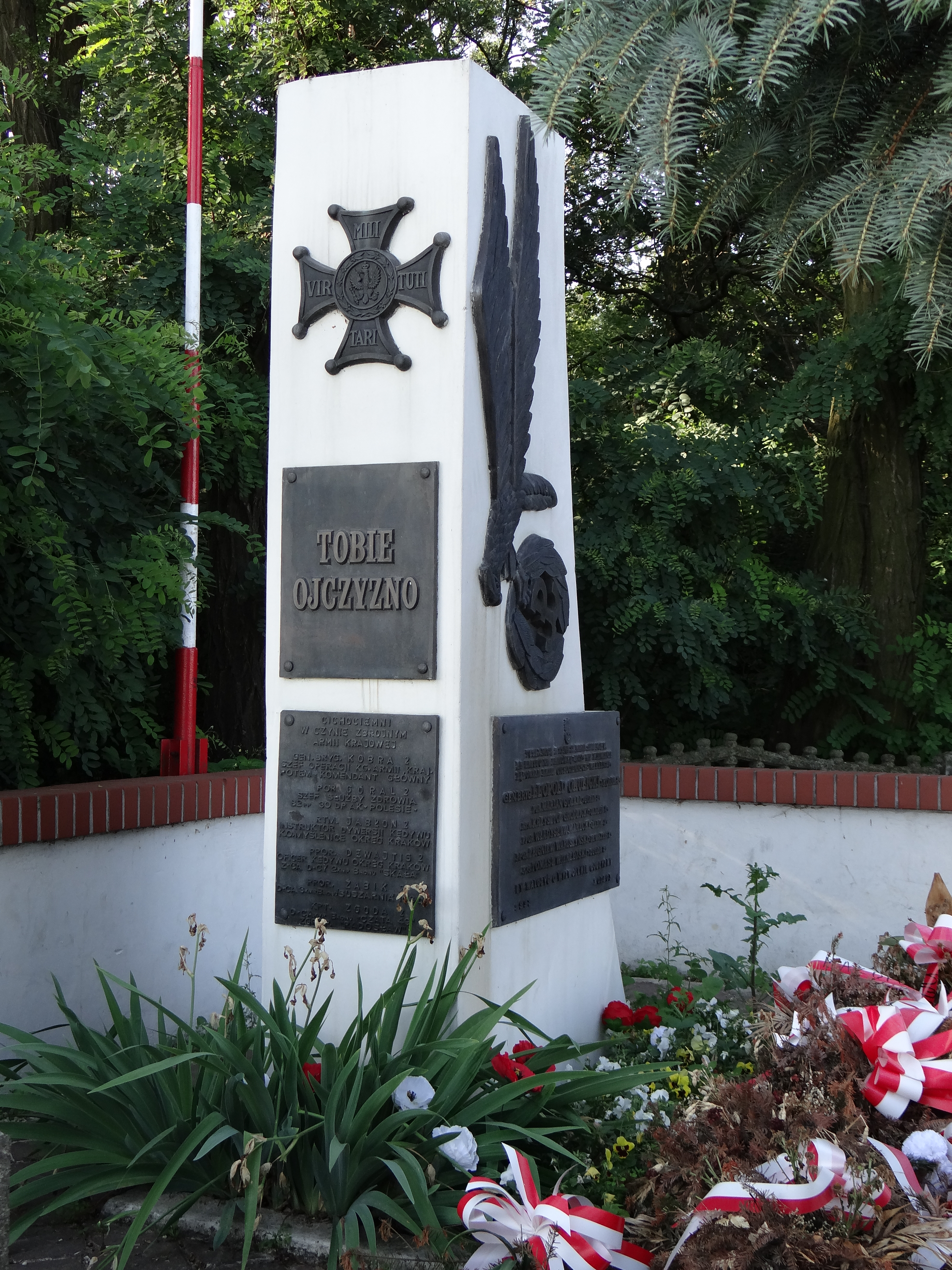 Wierzbno powiat Proszowice . Pomnik poświęcony akcji zrzutu Cichociemych 22 V 1944 roku.